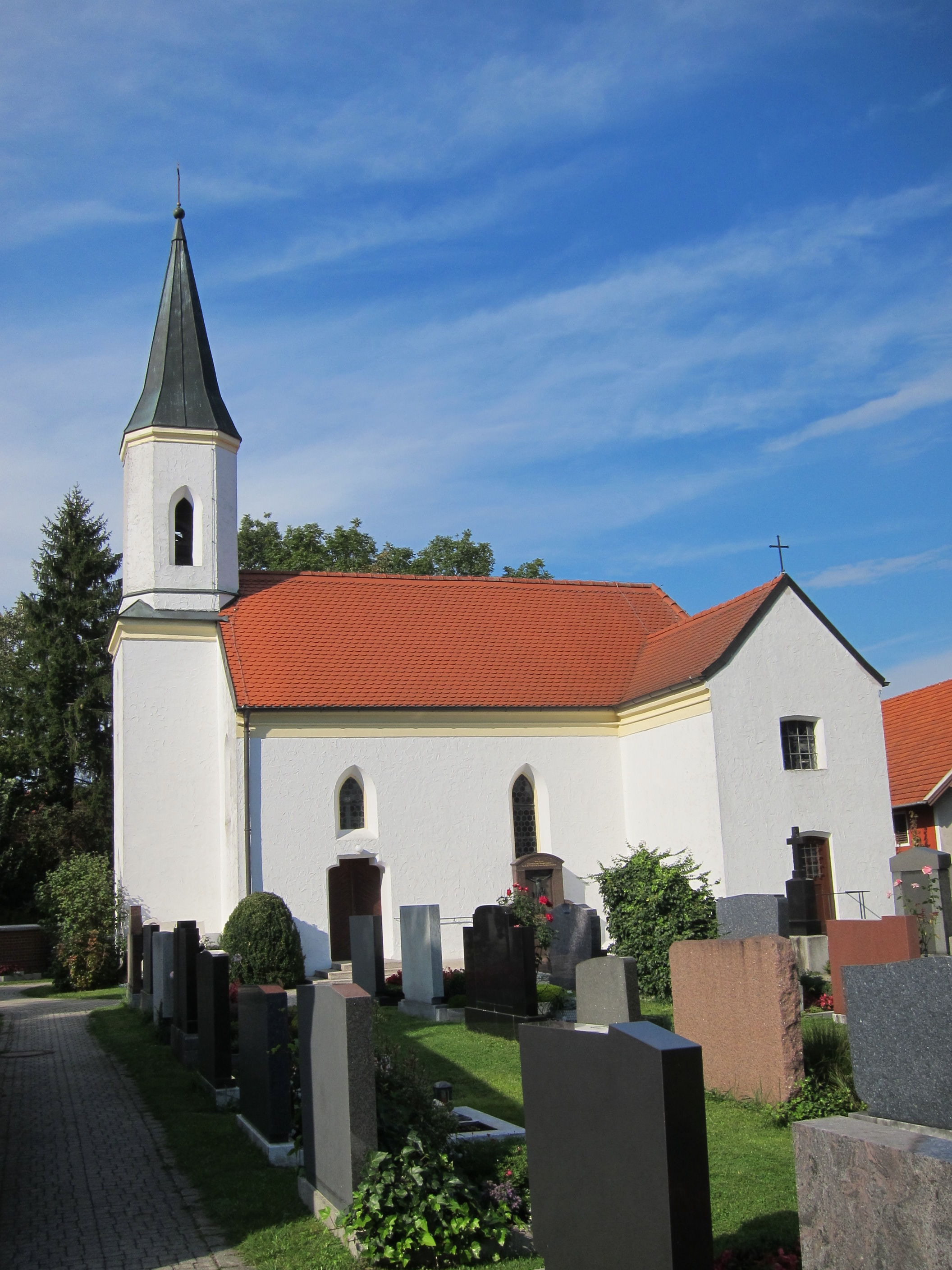 Karl-Kneidl-Weg 3, Kath. Filialkirche St. Johannes der Täufer